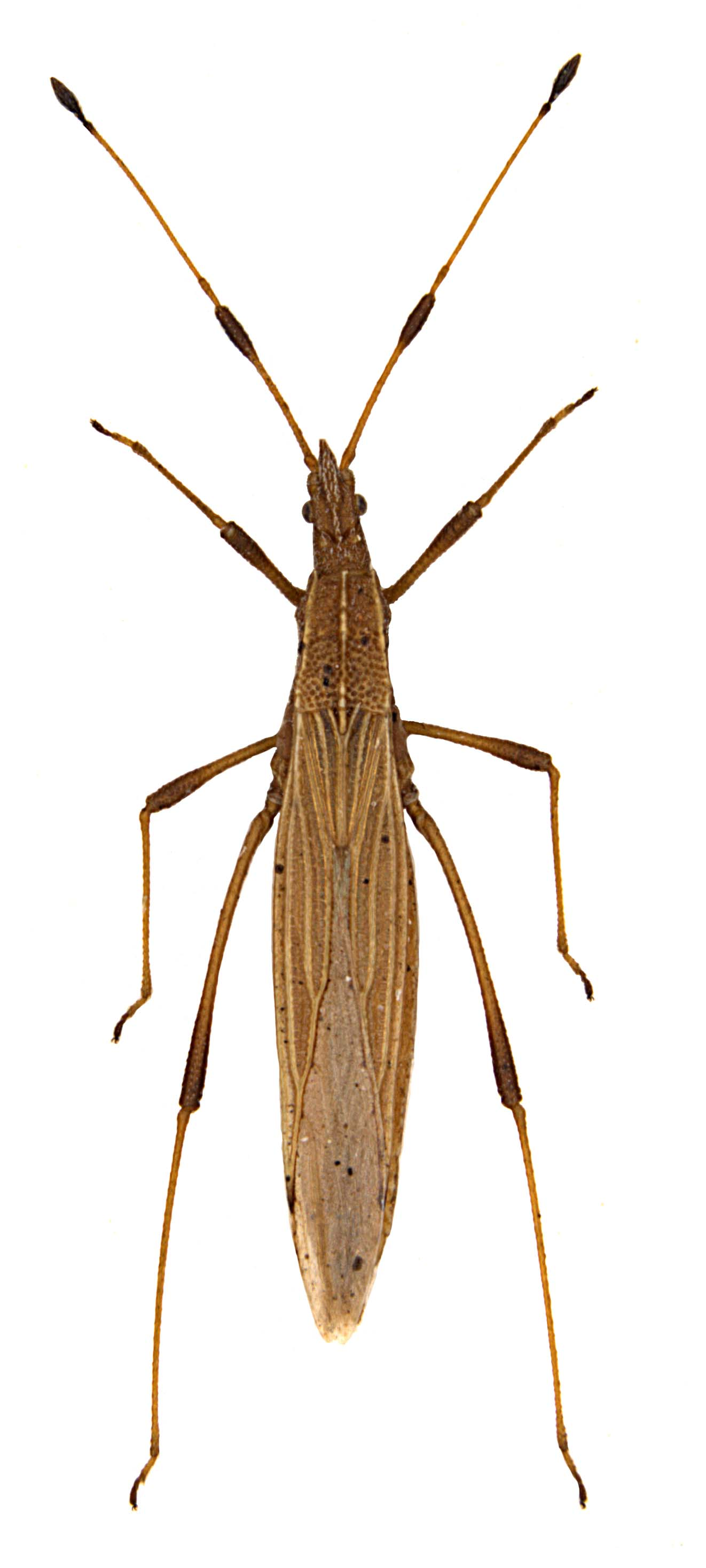 Berytinus minor, Habitus, Exemplar aus der Zoologischen Staatssammlung München, Foto: Marianne Müller